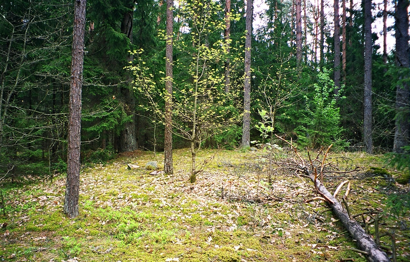 Ilčiūnų pilkapis